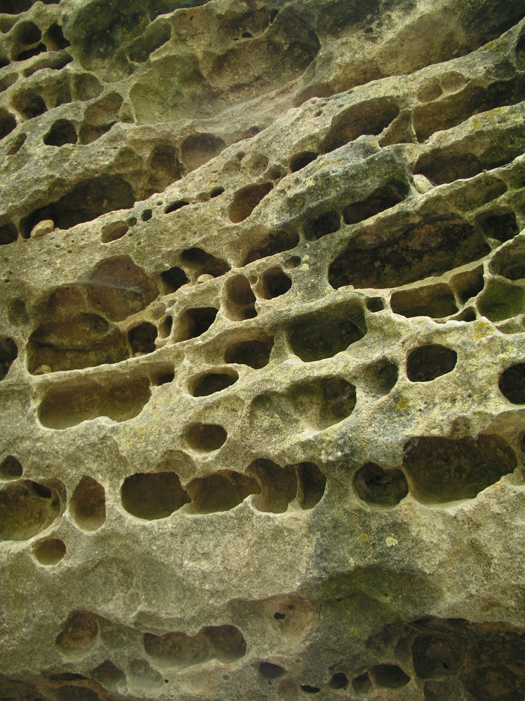 Caliza horadada. Prádena de la Sierra, Segovia.